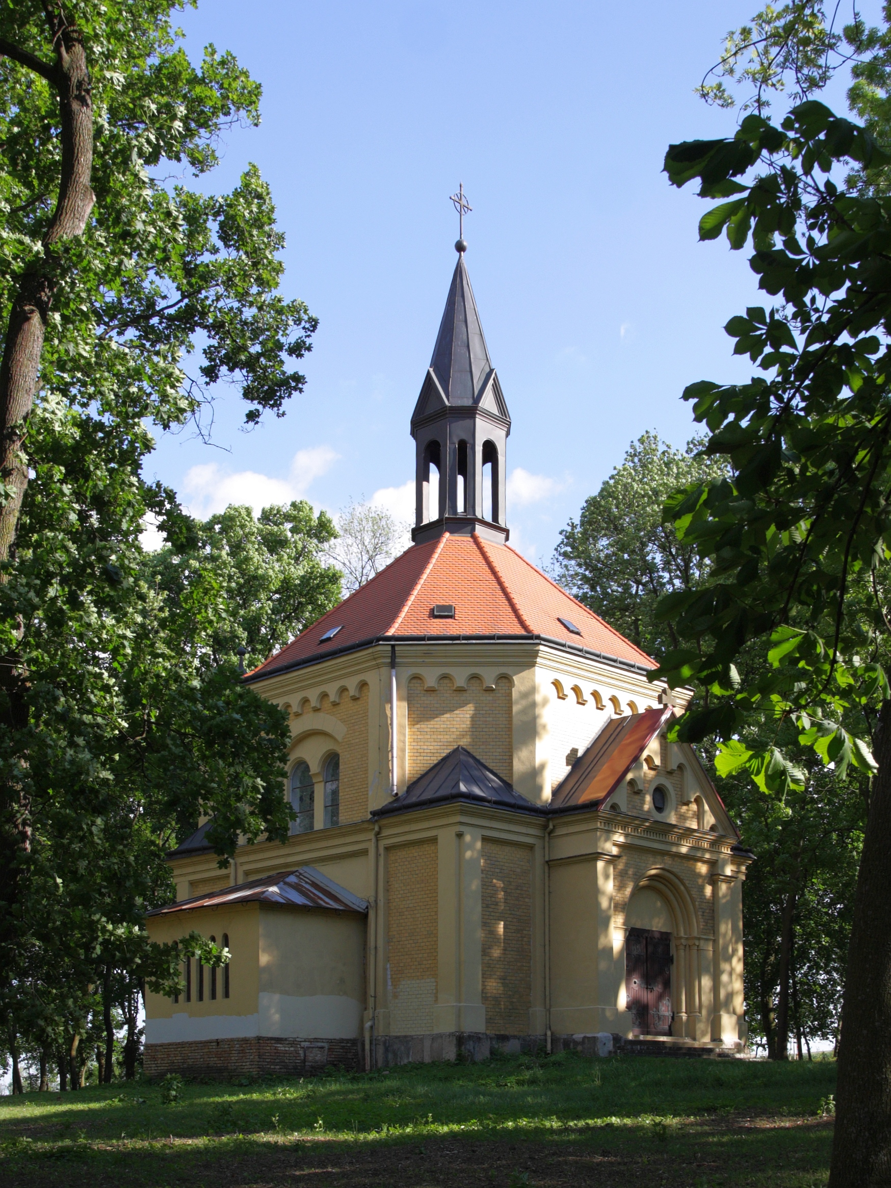 Hustopeče - kaple sv. Rocha.